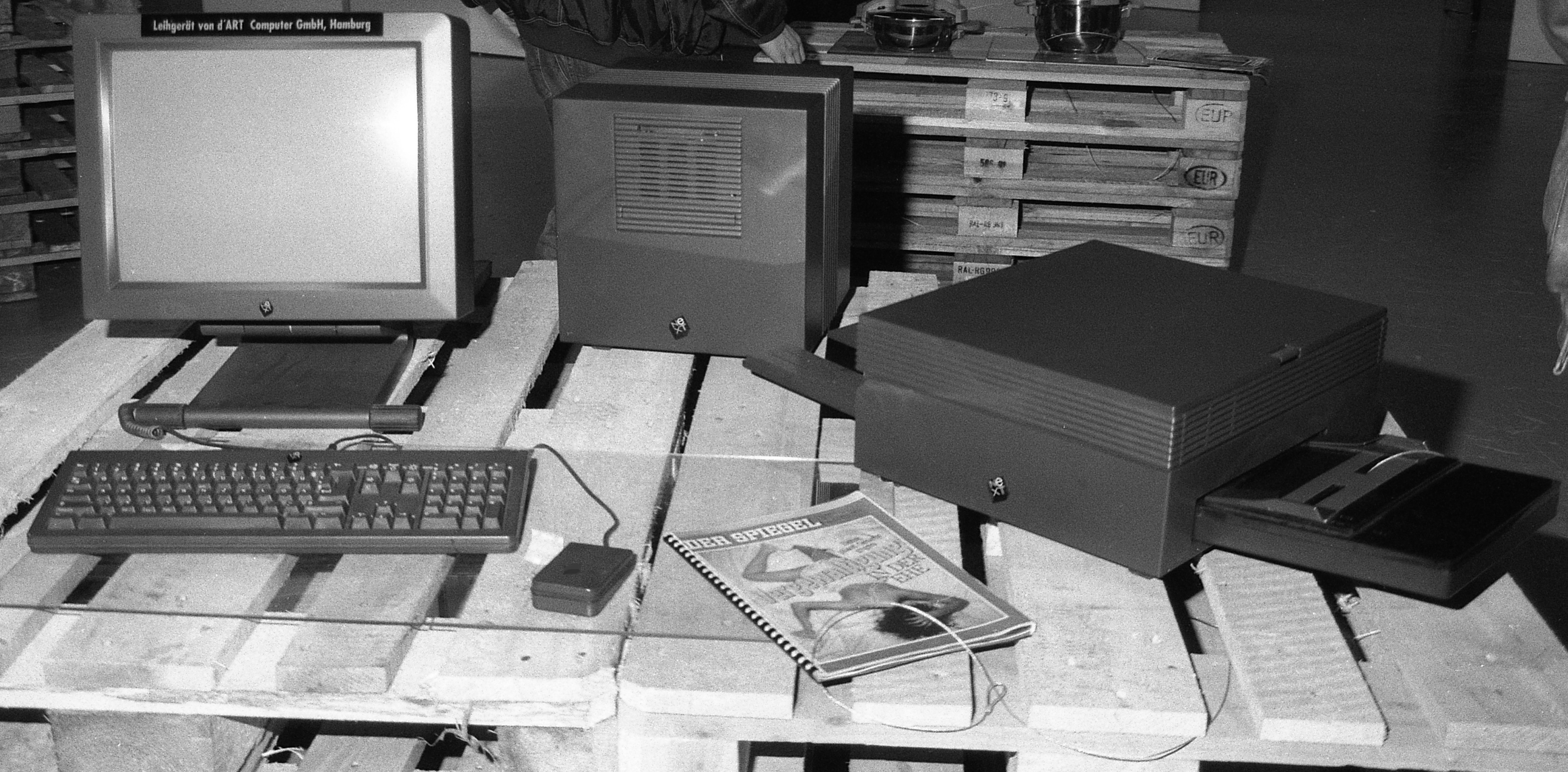 NeXTCube auf der Hannovermesse 1992